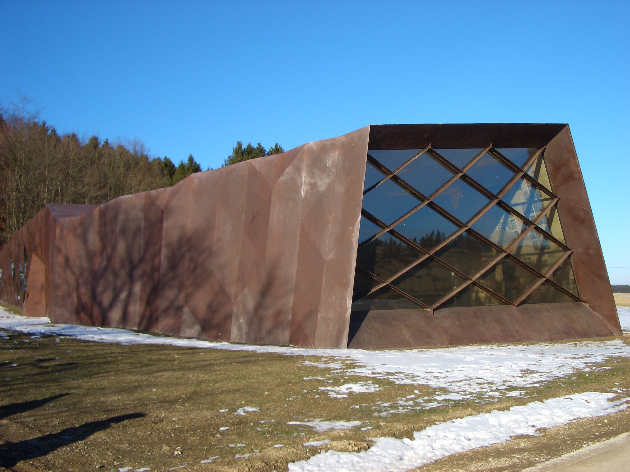 SS-Sonderlager/KZ Hinzert, documentation center, front view